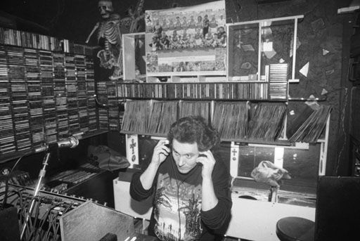 Heavy Metaller in der Disco Fantasy (1981-2001) in München-Neuaubing